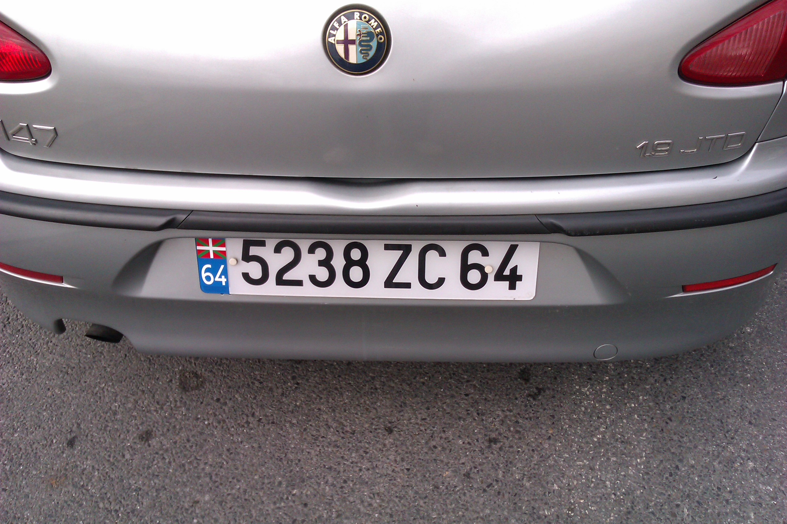 Basque License plate